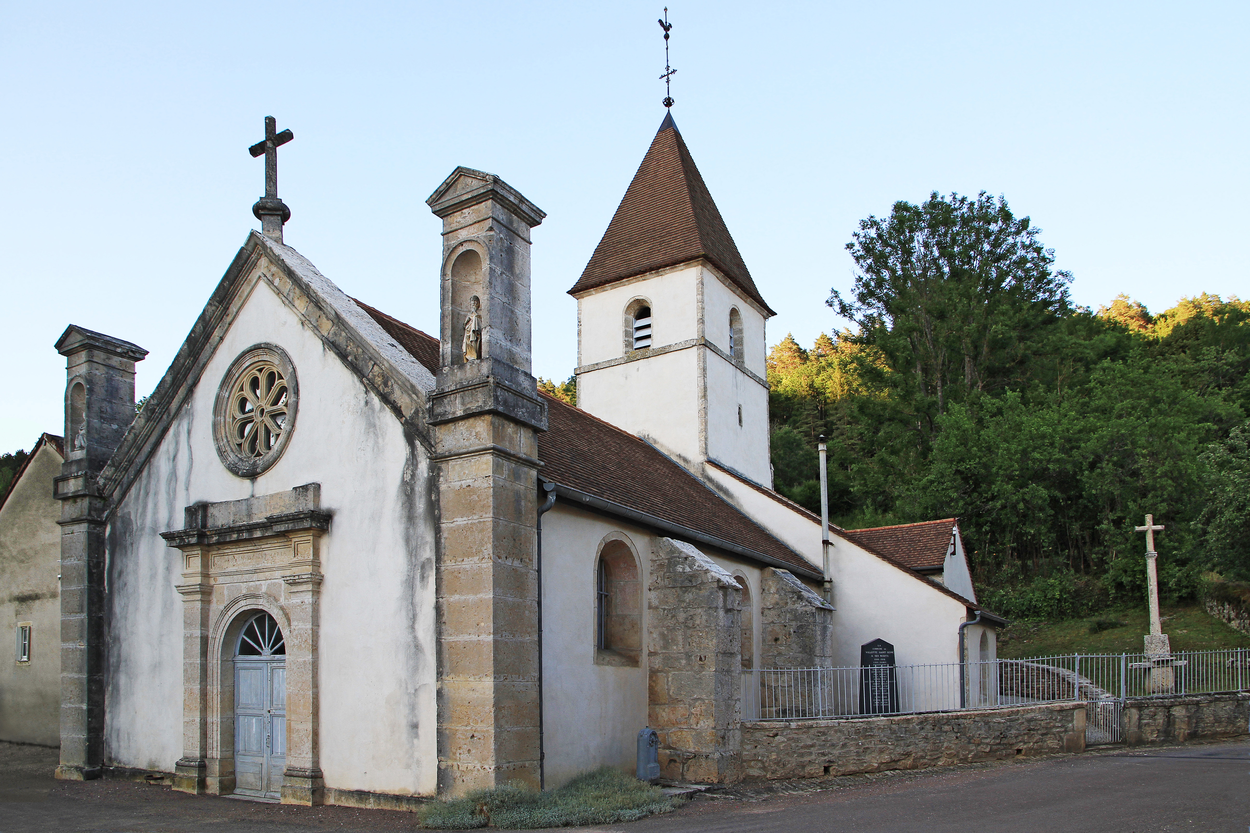 Église Saint-Blaise de Villotte-Saint-Seine